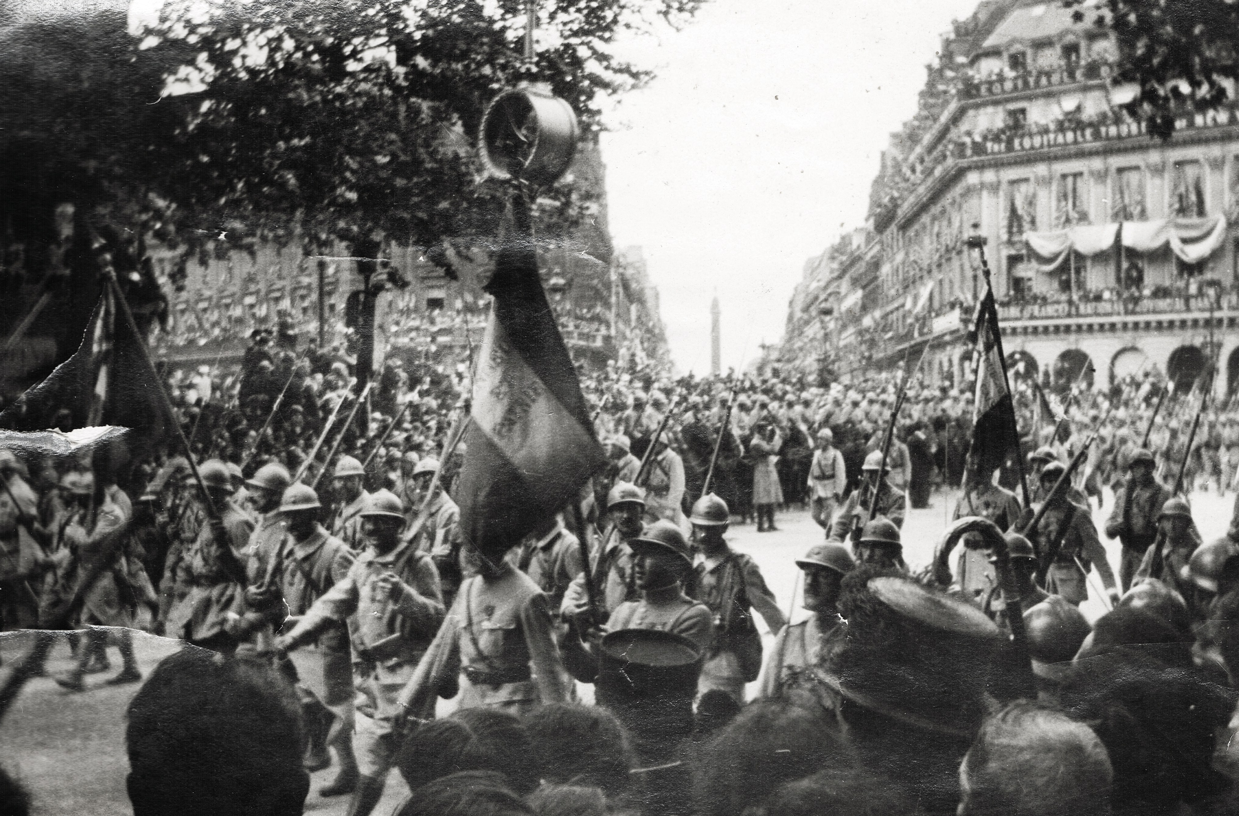 Défilé du 14 juillet 1919 à Paris. L'officier et négociant servannais Louis Miniac (1887-1952), du 247ème régiment d'infanterie, marchant physiquement à la gauche du porte-drapeau central. Collection Marie-Anne Miniac, Rennes, France.